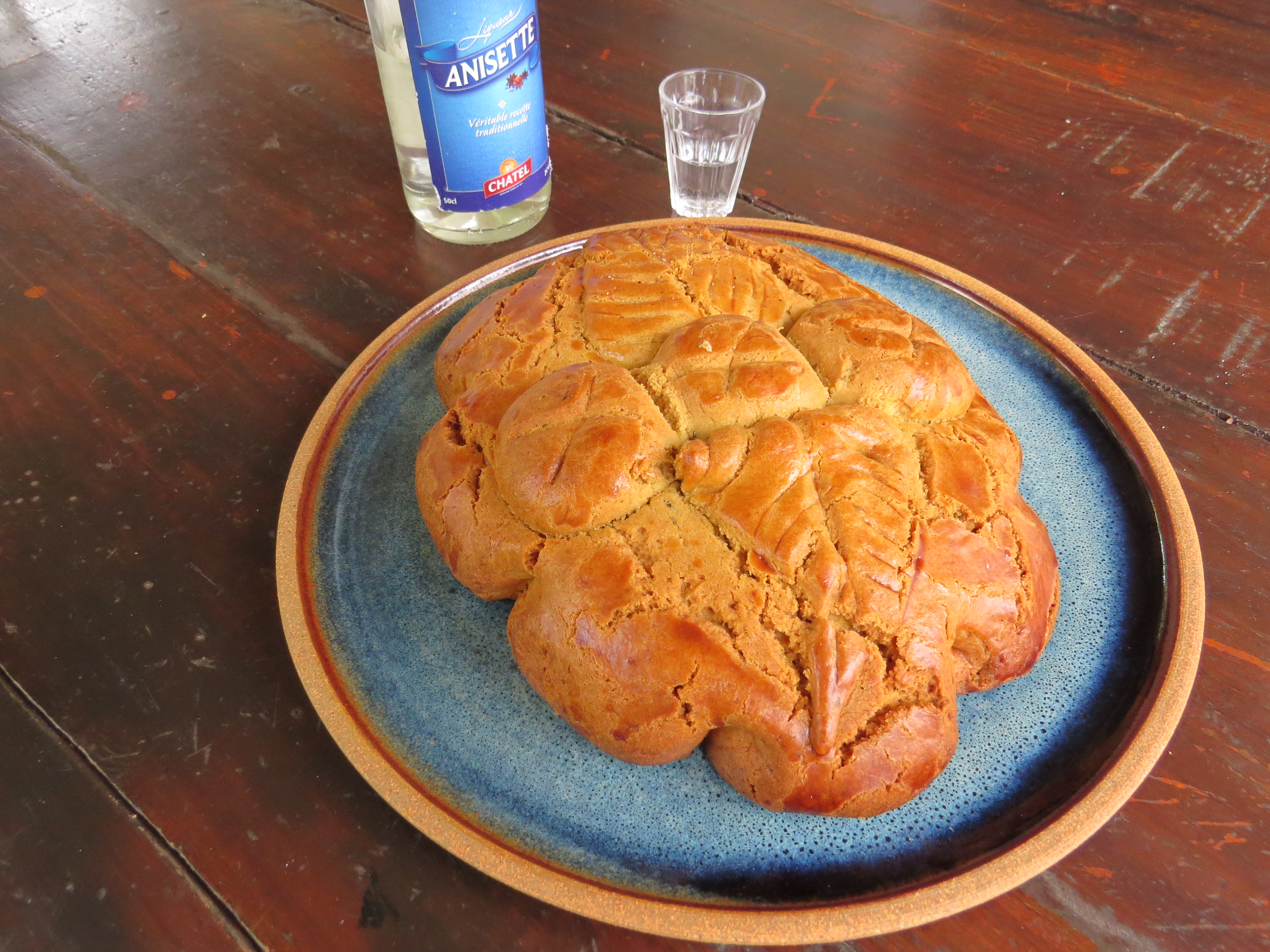 Spécialité culinaire de La Réunion